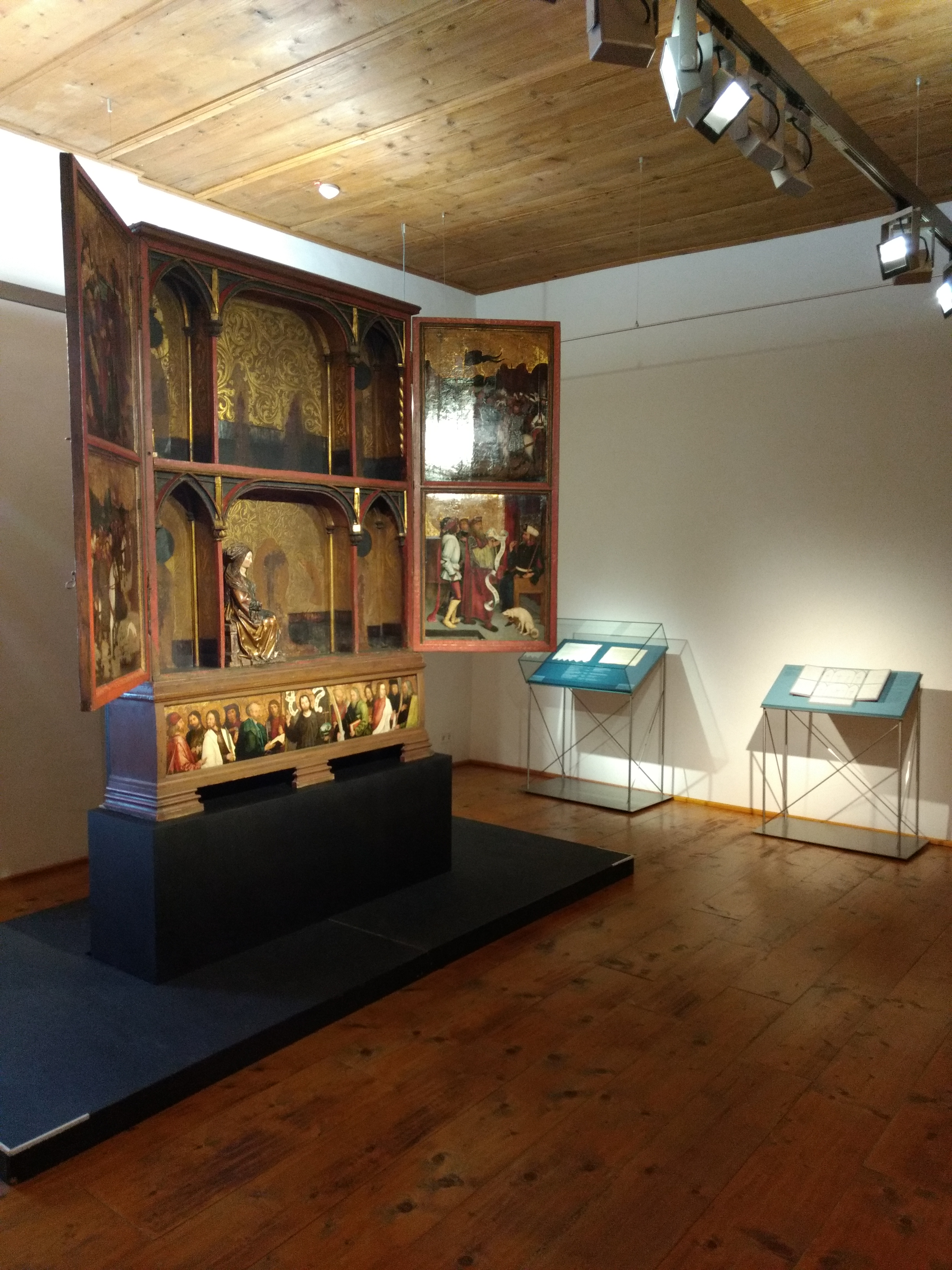 Strigelmuseum im Antoniterkloster Memmingen